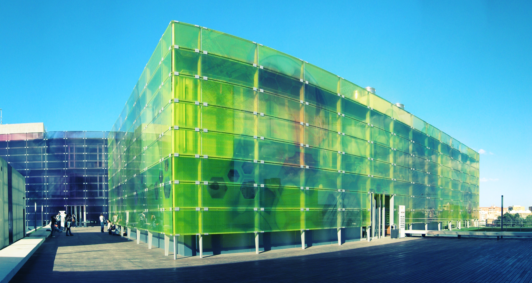 Ciudad Politénica de la Innovavación.